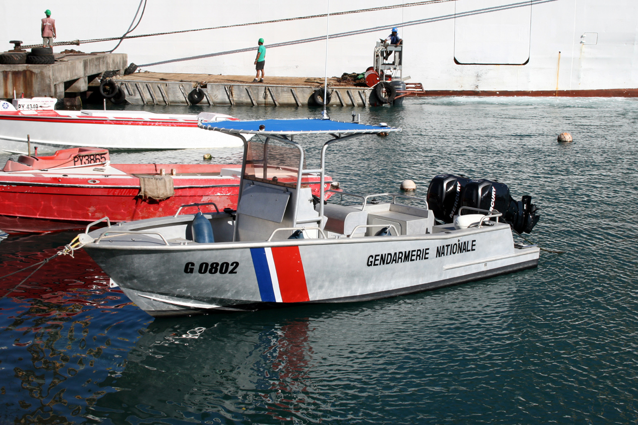 Bateau de la gendarmerie au port de Hakahau à Ua Pou